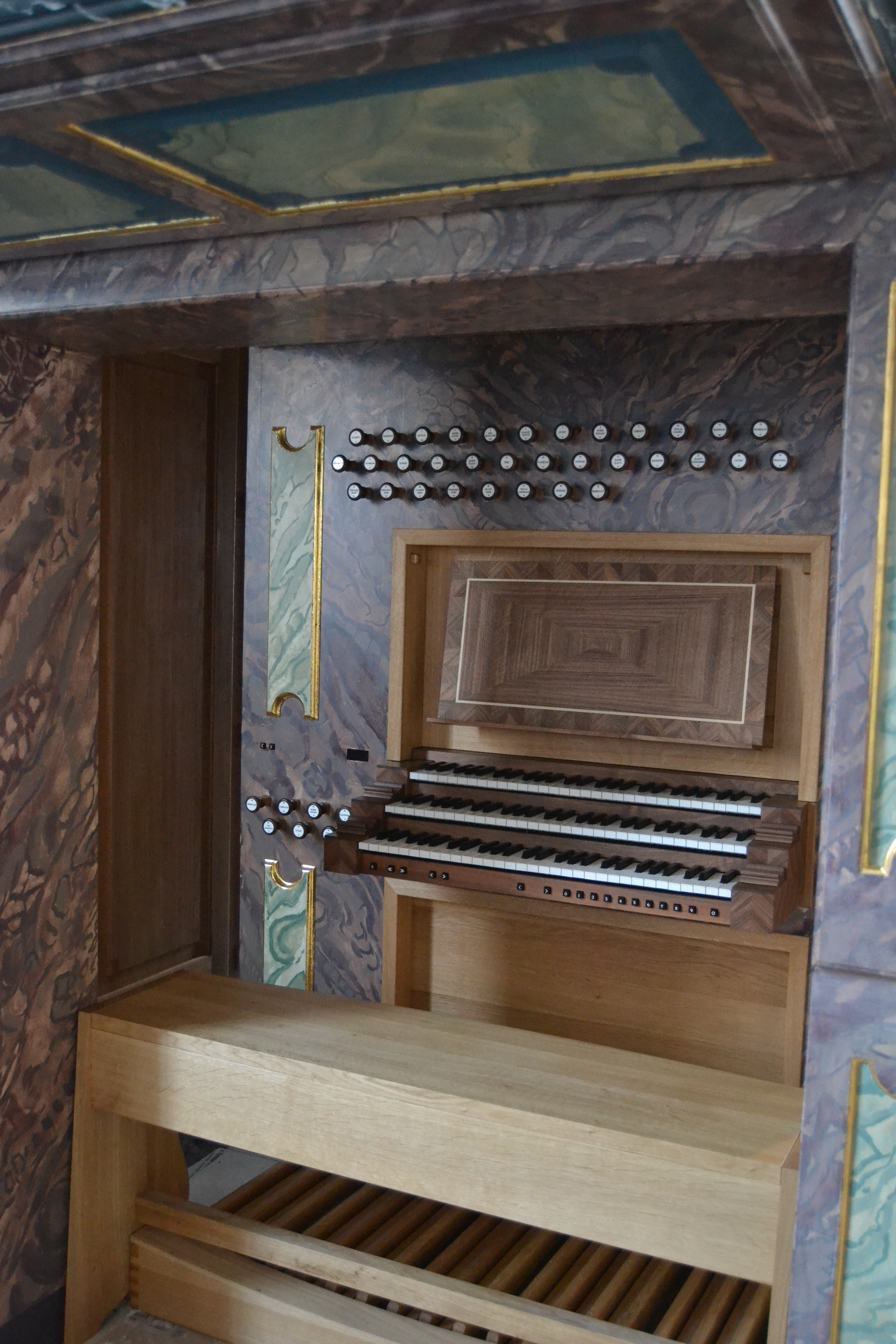 Die seitenspielige Spielanlage